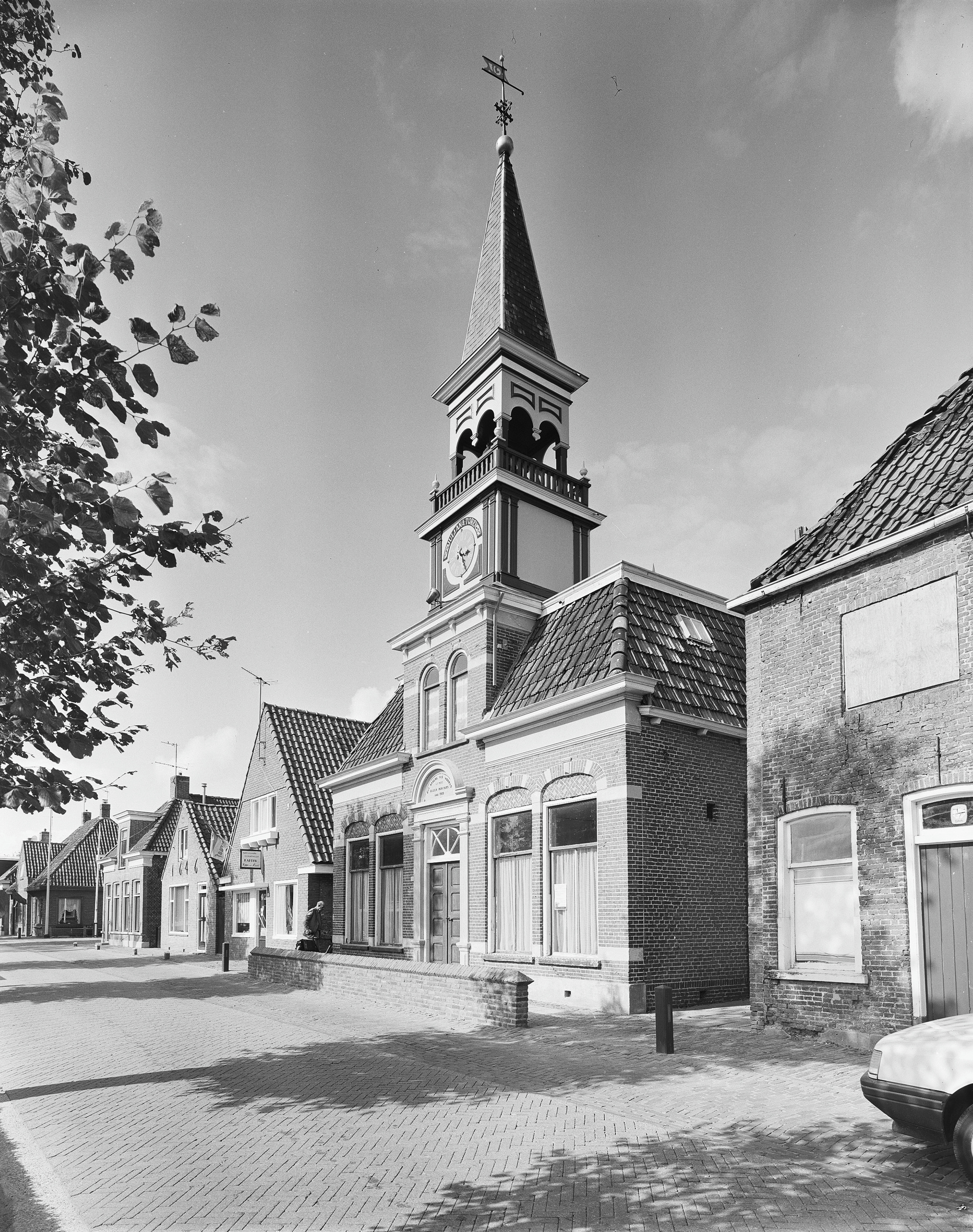 DOOPSGEZINDE KERK EN PASTORIE: Exterieur VOORGEVEL